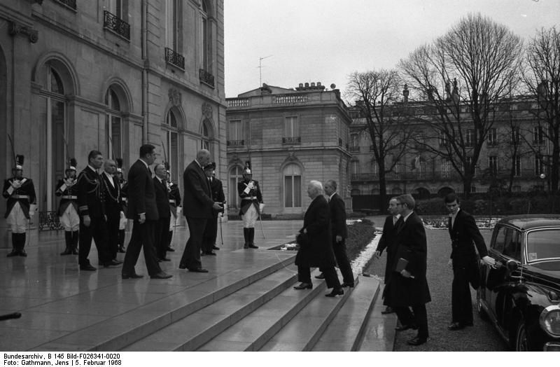 Einweihung der deutschen Botschaftsresidenz, Palais Beauharnais, in Paris: 2-17 Bundespräsidenet Lübke und Gattin besichtigen das "Jeu de Paume" in Begleitung der Botschafter-Gattin Frau Klaiber. 20-22 Frühstück im Elisée für Bundespräsident Lübke.